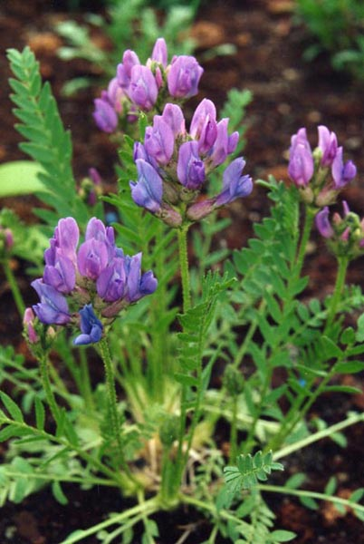 Oxytropis borealis var. viscida